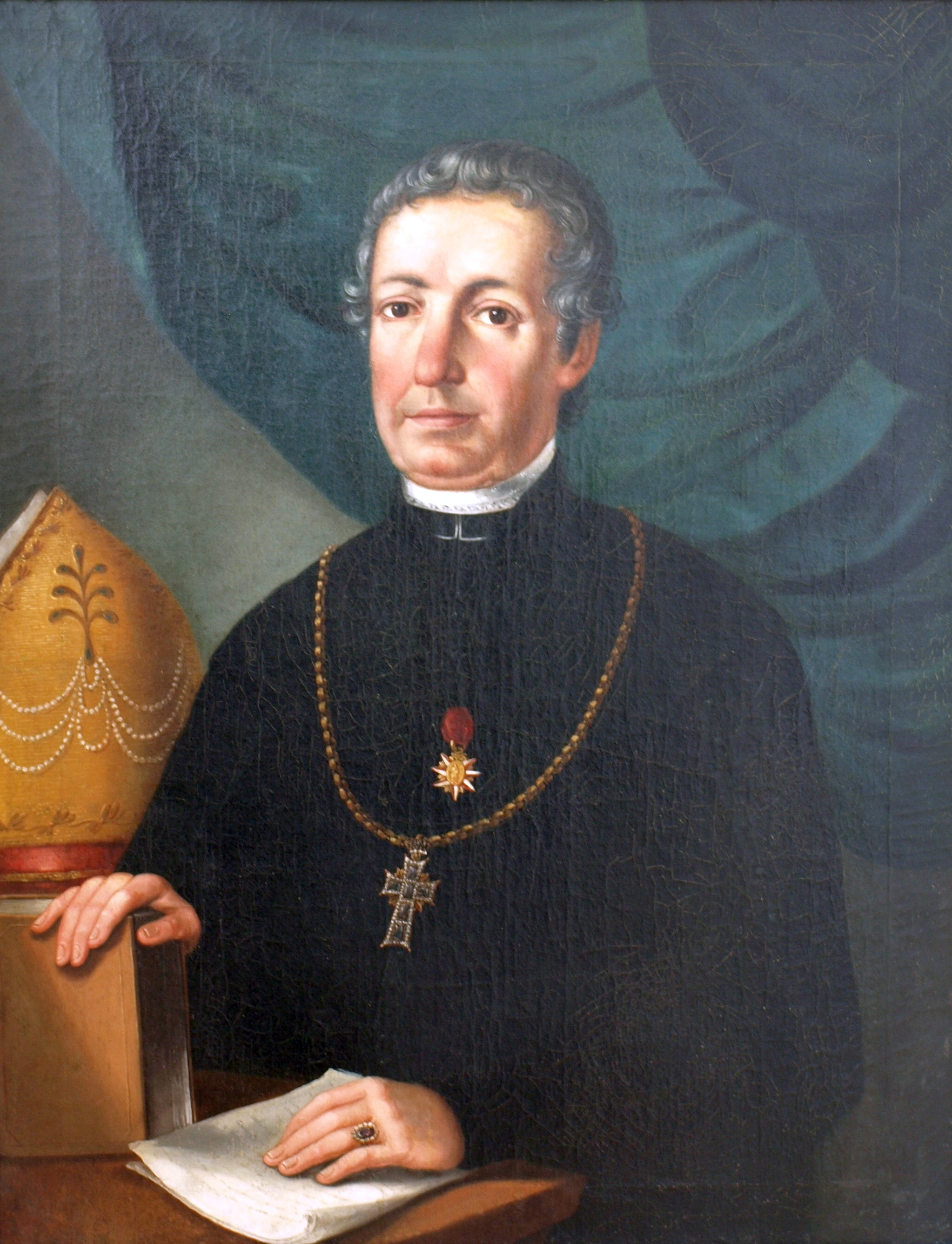 Kanovník Václav Kára, kolem roku 1850